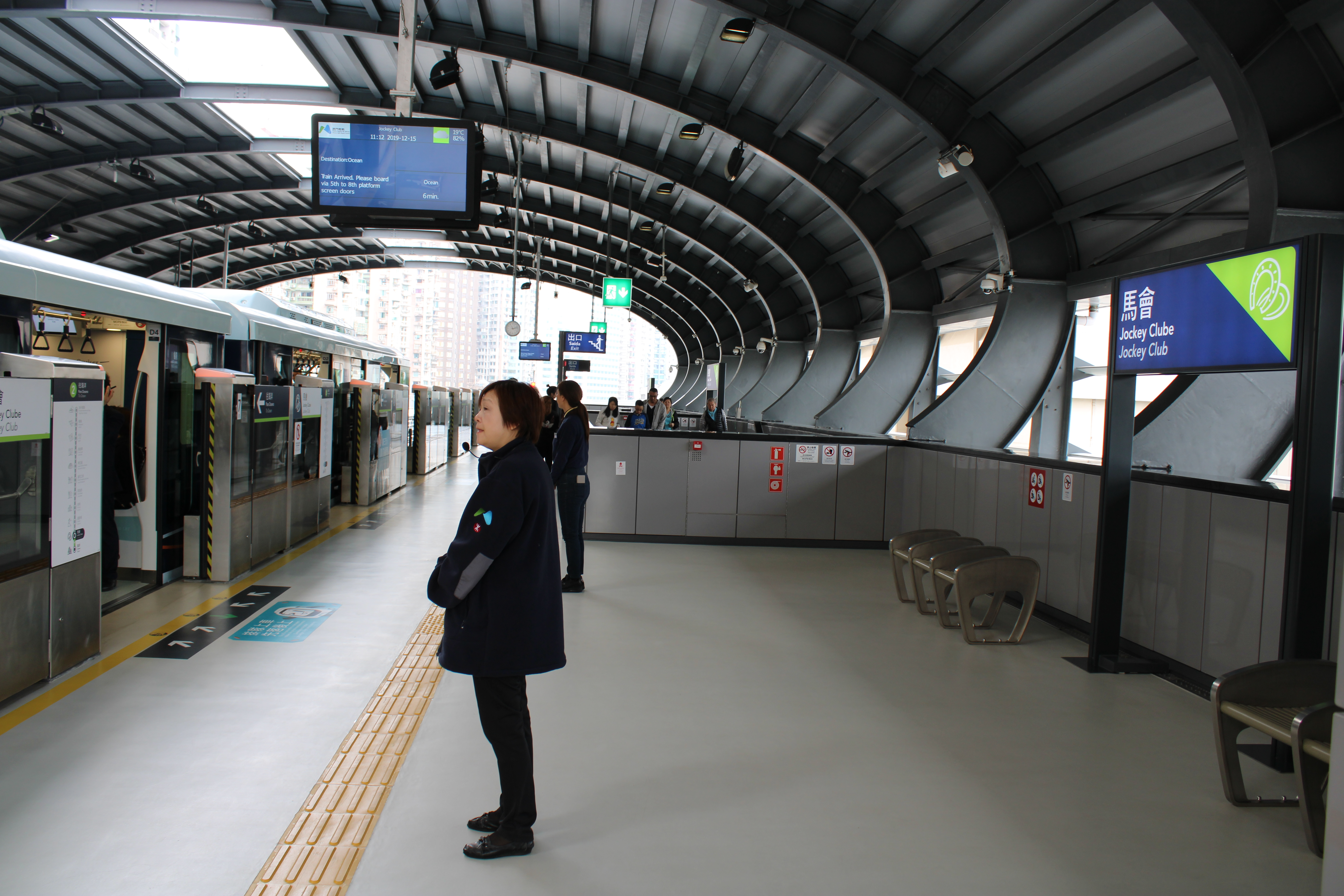 2019年12月的澳門輕軌氹仔線馬會站月臺。